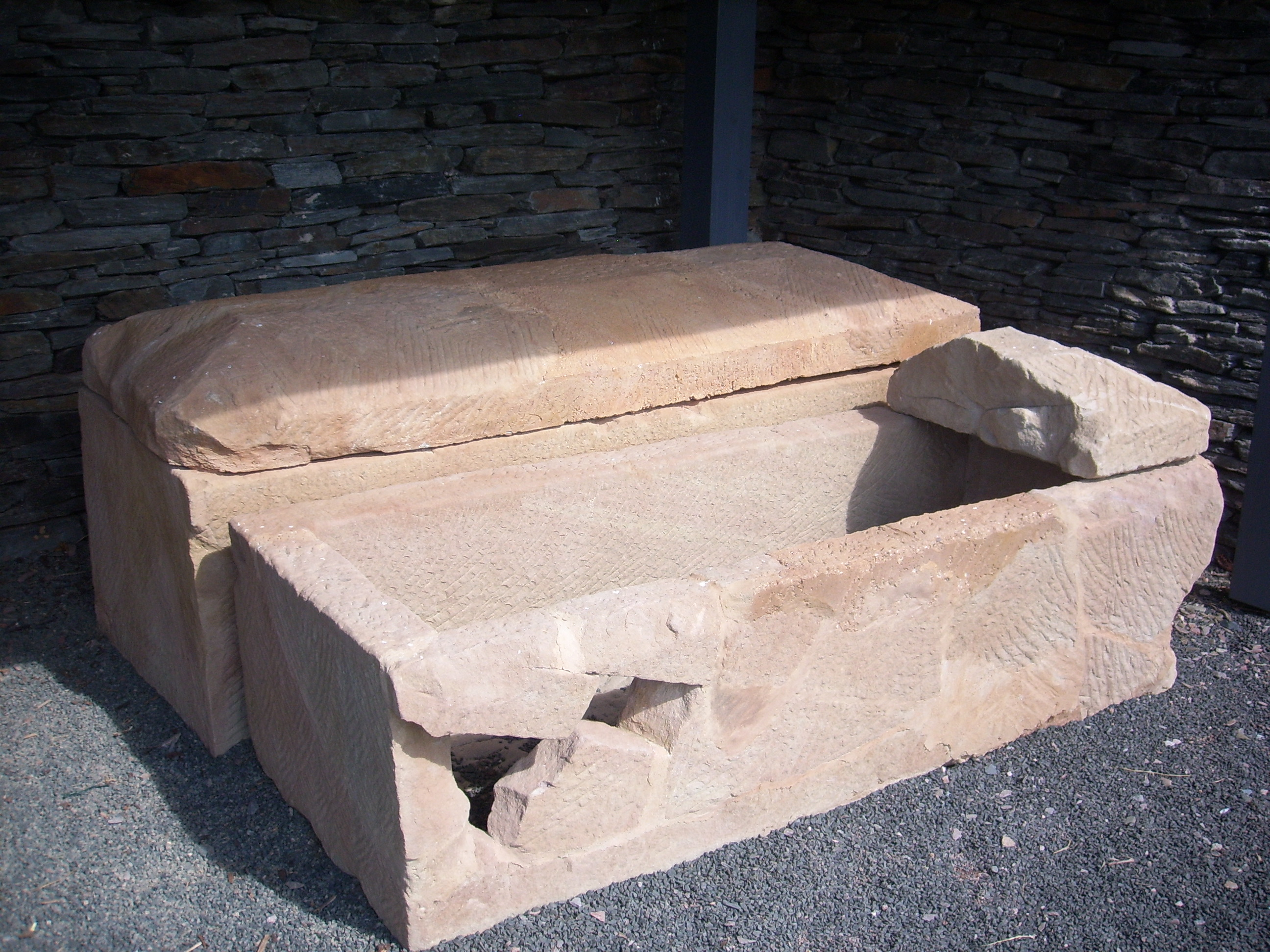 Sarcofagen bij Trittenheim (Foto Ruben A. Koman, 2011)